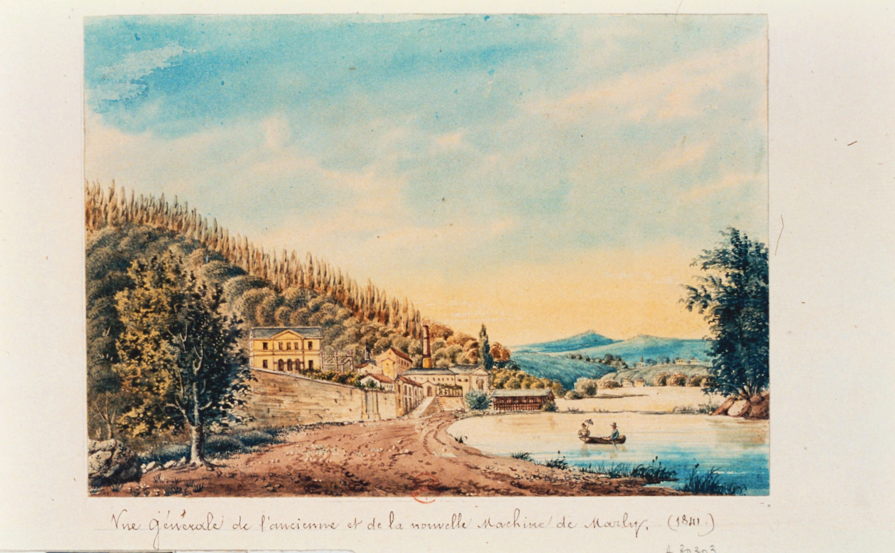 Vue générale de l'ancienne et de la nouvelle machine de Marly. S. & Oise